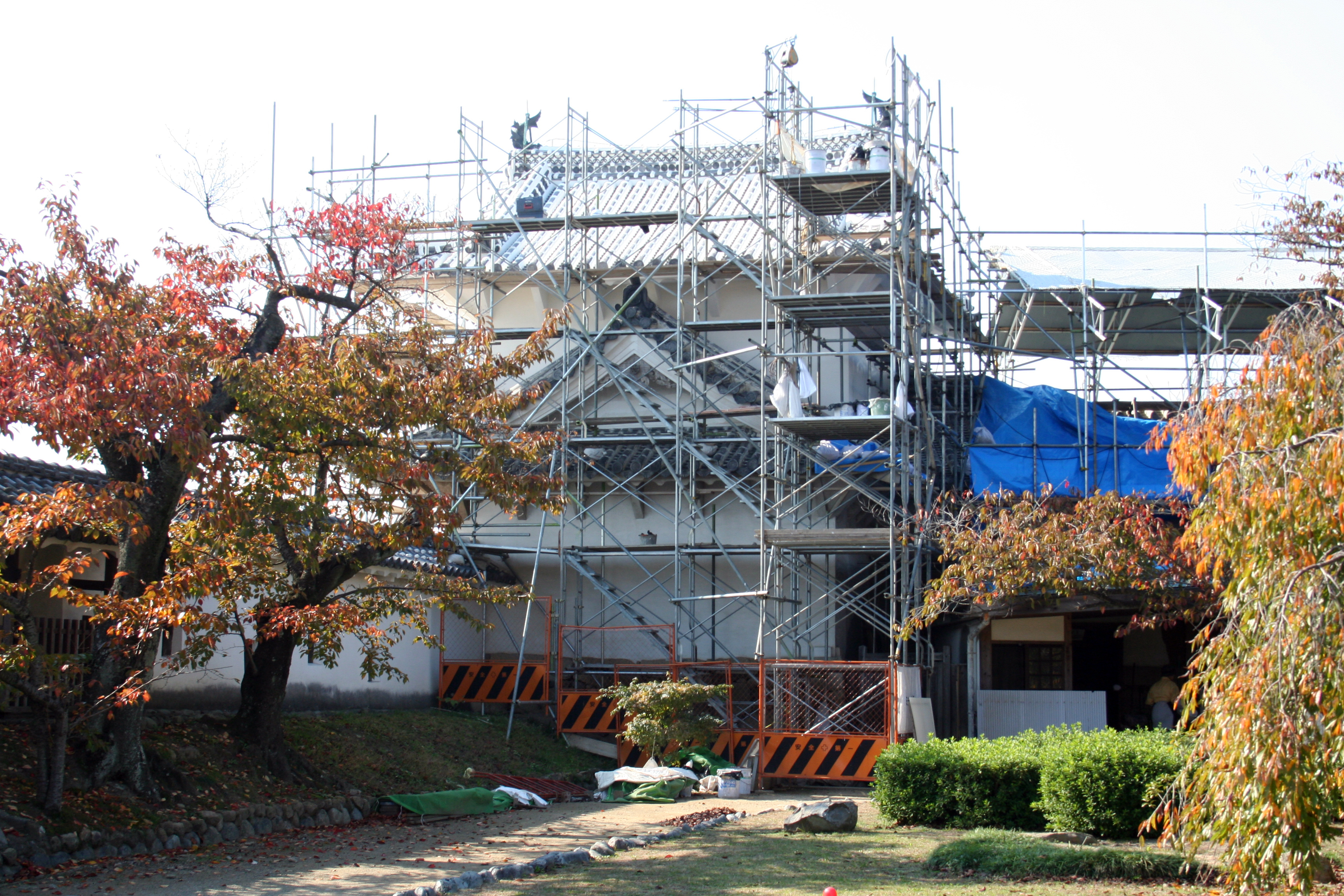 2009年秋の姫路城。 西の丸にある修理中のワの櫓。